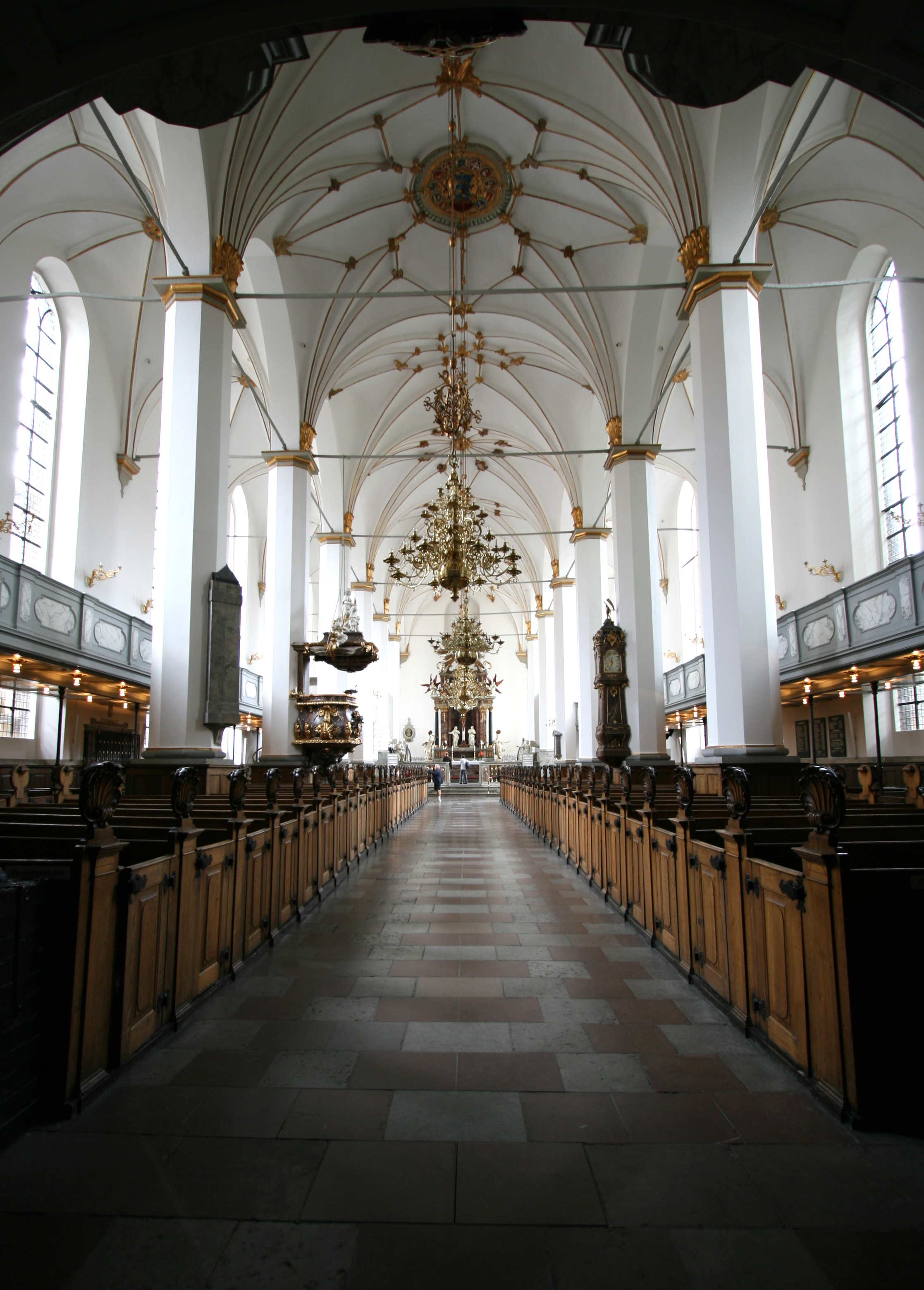 Trinitatis Kirke, Copenhagen, Denmark. Interiør, vidvinkel, portrætformat.